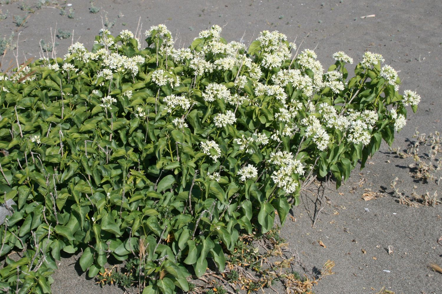 Cionura erecta, Hundsgiftgewächse (Apocynaceae), Seidenpflanzengewächse (Asclepiadoideae) - Türkei/Türkiye/Turkey: Sakarya Prov./Sakarya ili, Sandküste des Schwarzen Meers (Karadeniz) bei Kocaali E Karasu